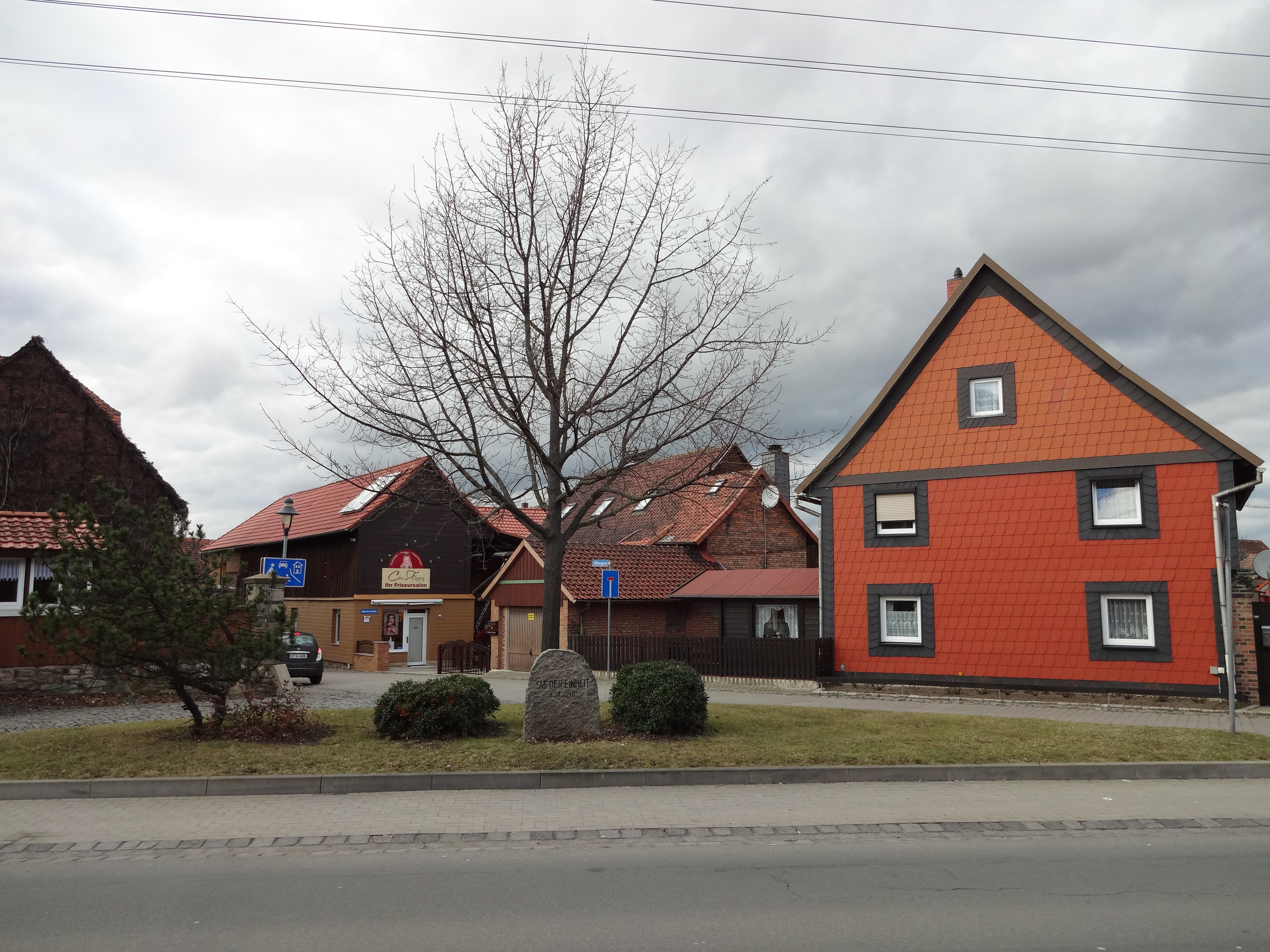 ehemals denkmalgeschützte Platzsituation Eingang zur Müllergasse/Harzstraße in Silstedt, Ortsteil von Wernigerode